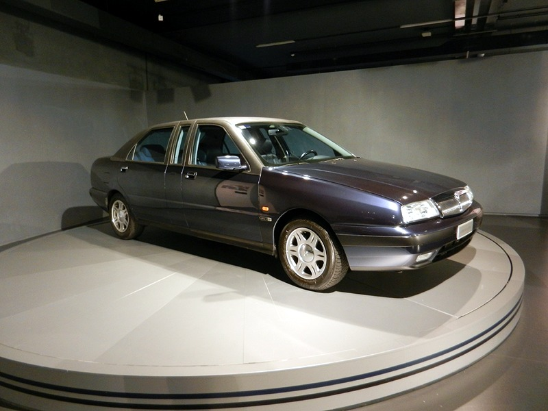 Torino - Lancia K Limousine del 1997 in mostra al Museo dell'Automobile